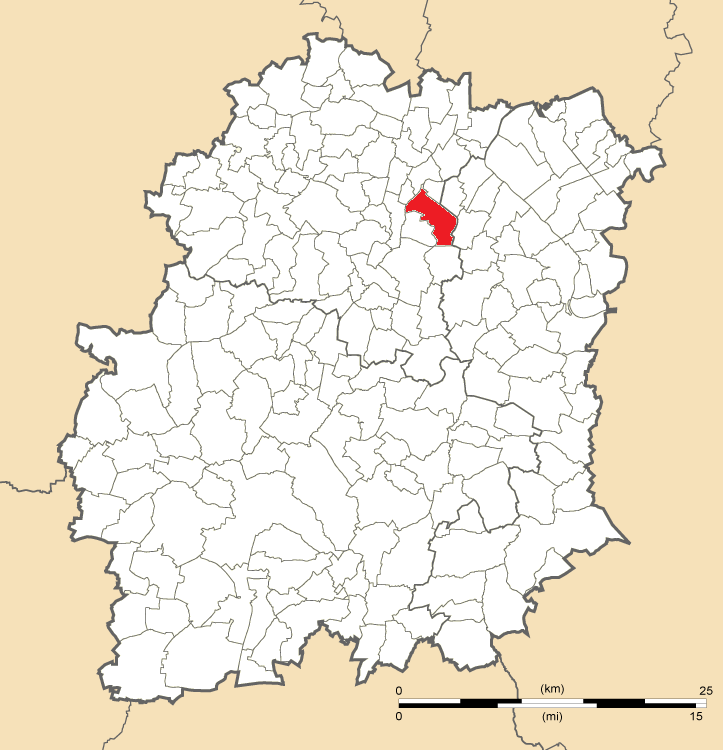 Carte de position de Sainte-Geneviève-des-Bois en Essonne